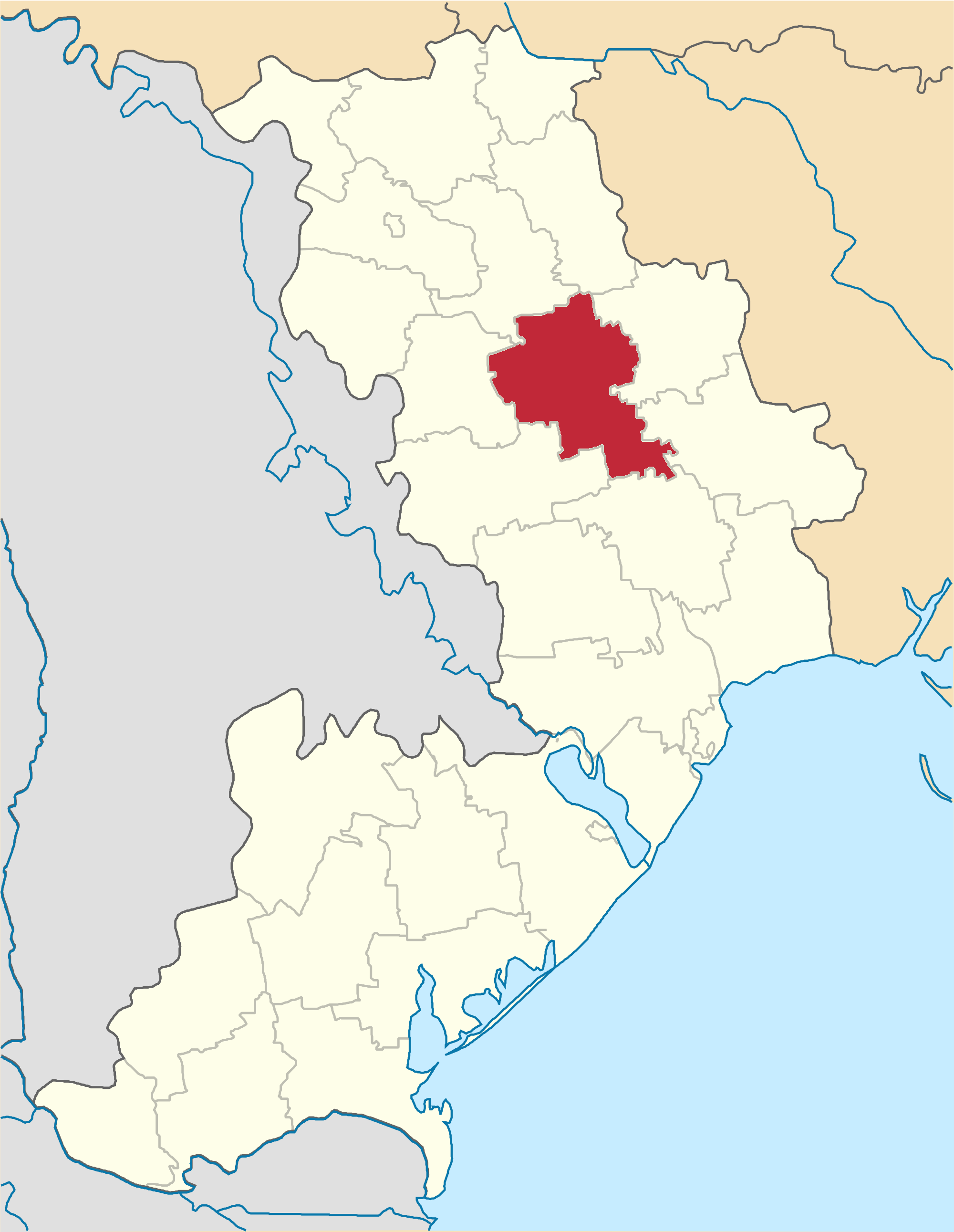 Shyrayevskyi-Raion map